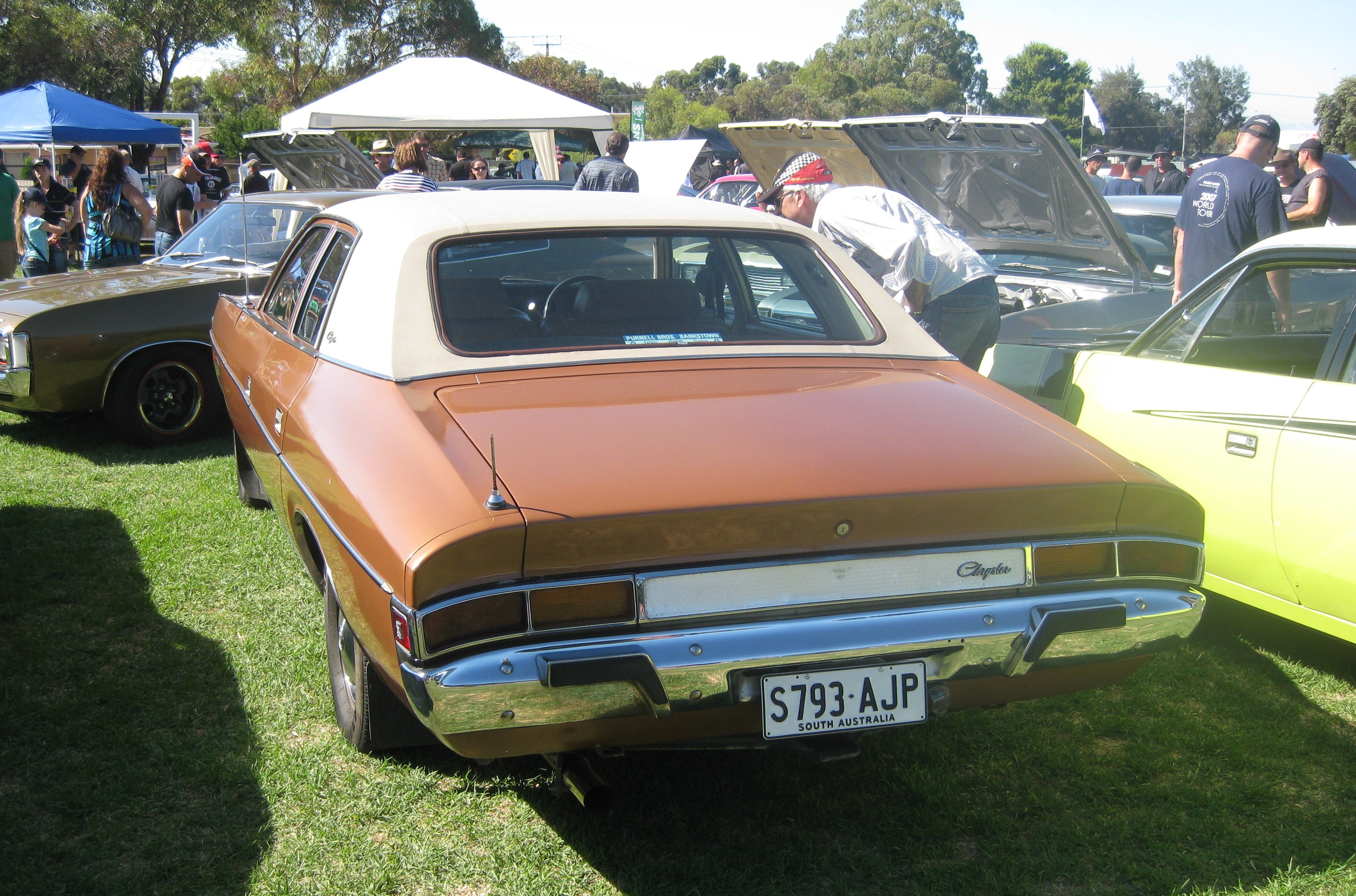 Chrysler CH Sedan (1971-1973)